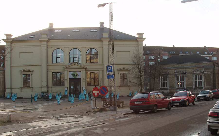 Huset Århus, Denmark